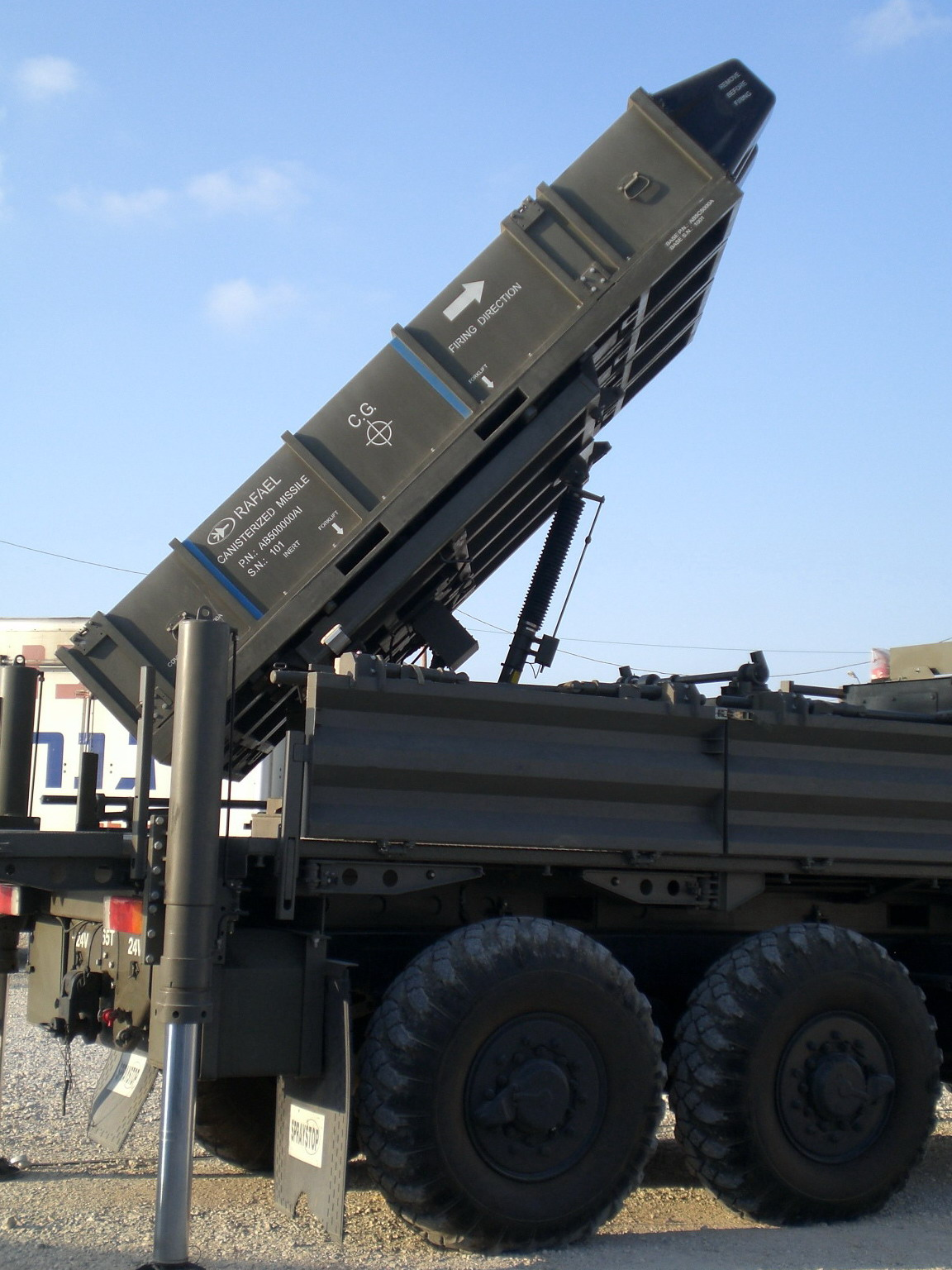 SPYDER launcher